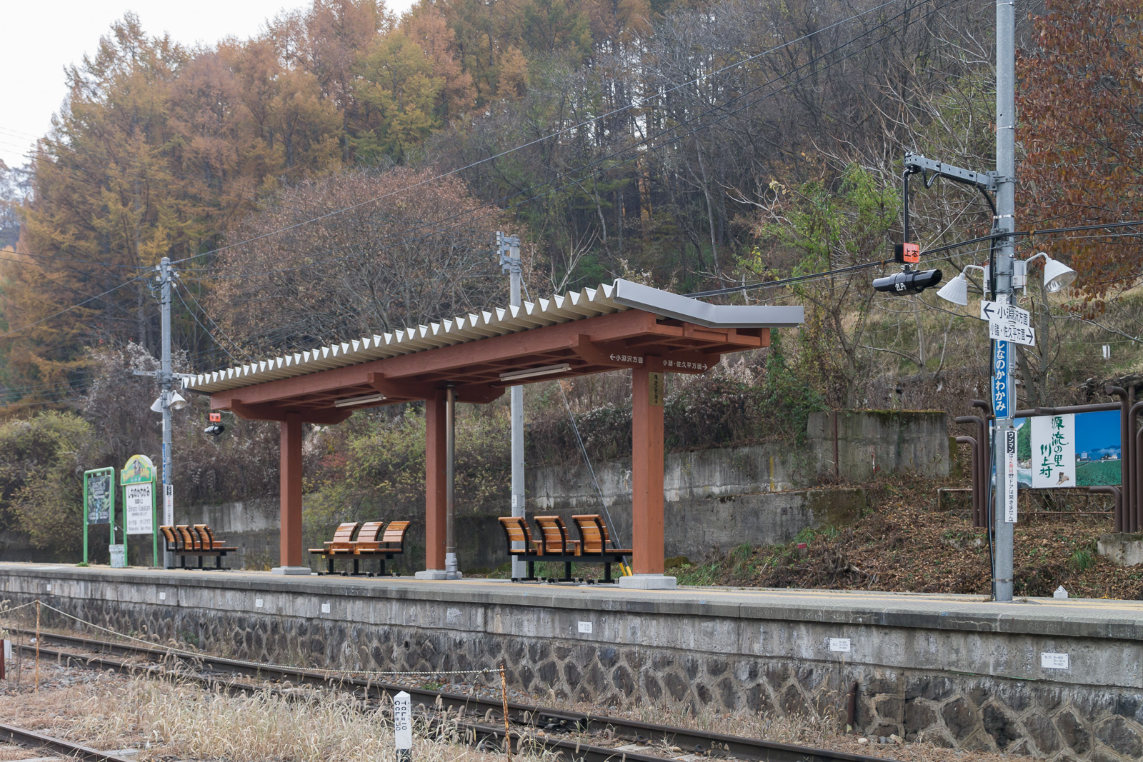 JR東日本小海線信濃川上駅、長野県南佐久郡川上村。